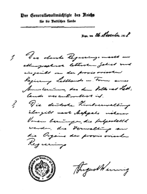 Anerkennung der lettischen Regierung und des Volksrates durch das Deutsche Reich. Handschriftlich durch August Winnig